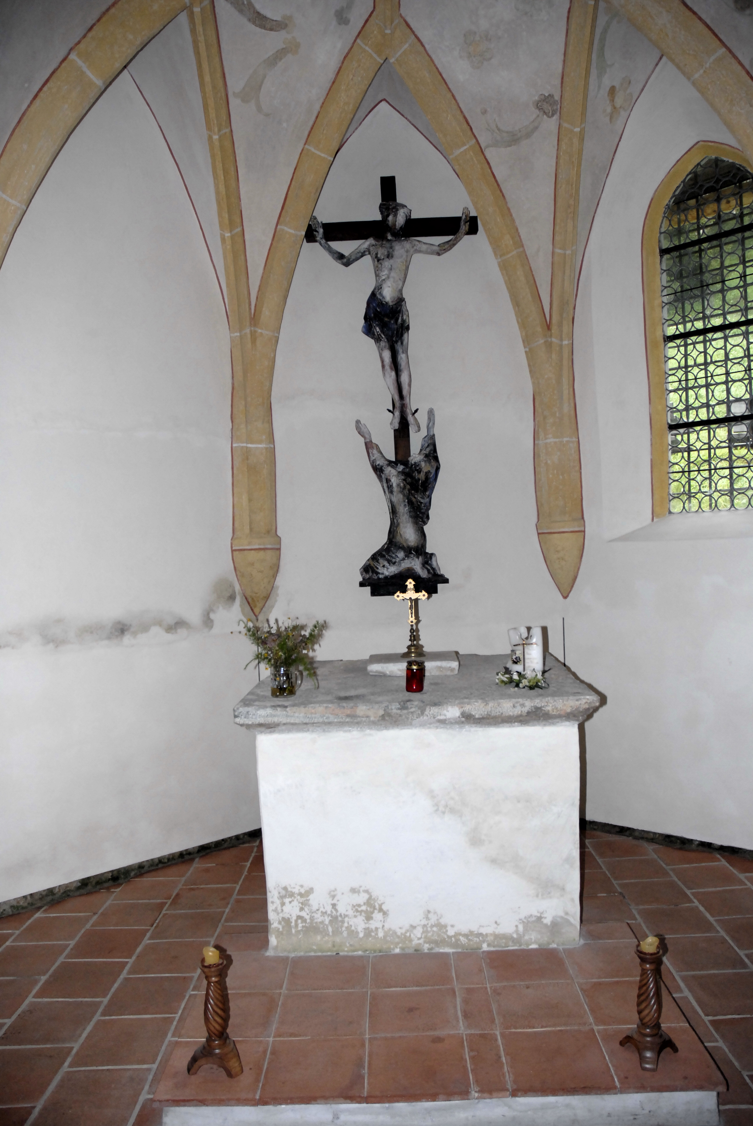 Altar der Wallfahrtskapelle St. Magdalena im Gschnitztal. Holzkruzifix mit der Heiligen Magdalena von Hans Pontiller